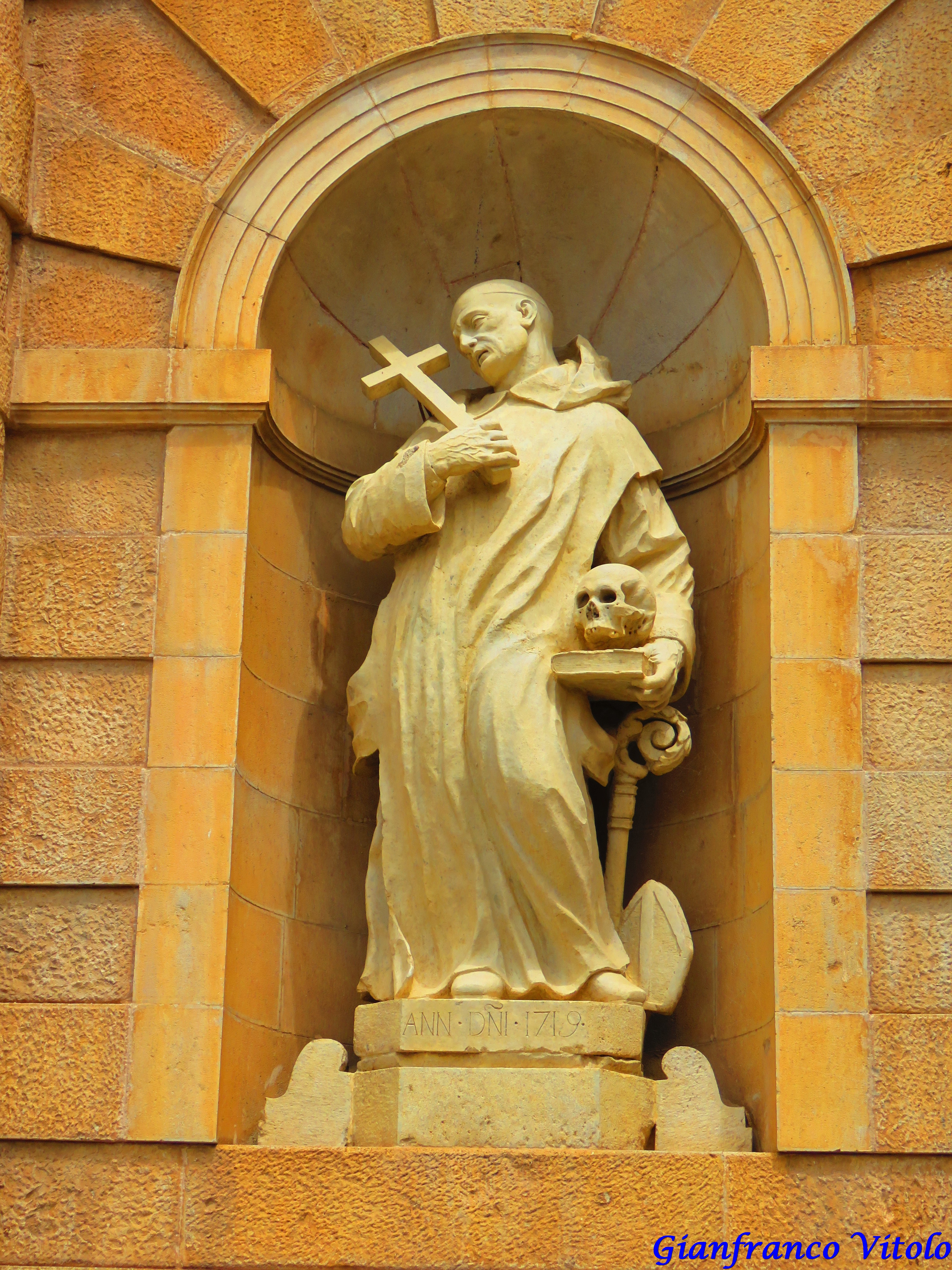 Statua di San Lorenzo all'ingresso della Certosa di Padula, di cui è titolare. (anno 1719)